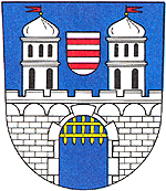 Česky: znak obce Vilémov V modrém štítě stříbrná kvádrovaná hradba s prázdnou branou s vytaženou zlatou mříží. Z hradby vynikají dvě stříbrné věže, každá se dvěma římsami, z nichž spodní dělí věž na horní nižší a dolní vyšší patro, v nich pět (3, 2) černých obloukových oken, dolní vyšší. Na horní římse kopule zakončená makovicí a červeným do stran vlajícím praporkem s vlaštovčím ocasem. Mezi věžemi stříbrný štítek se třemi červenými břevny.